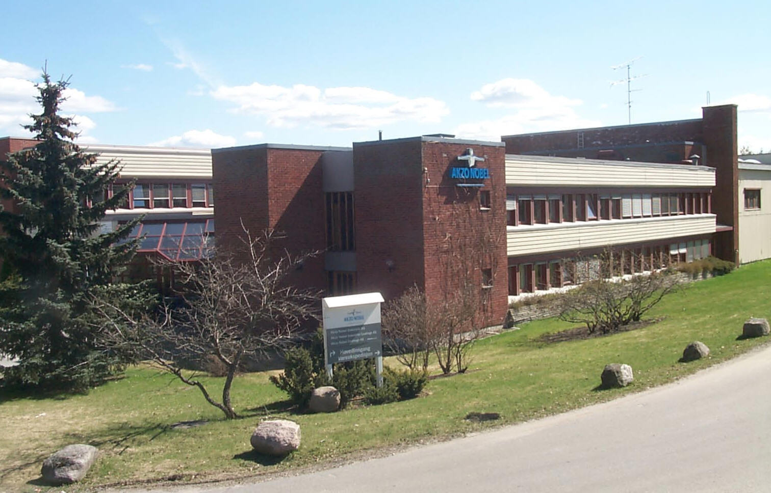 Bilde av Akzo Nobels hovedkvarter på Sofiemyr utenfor Oslo